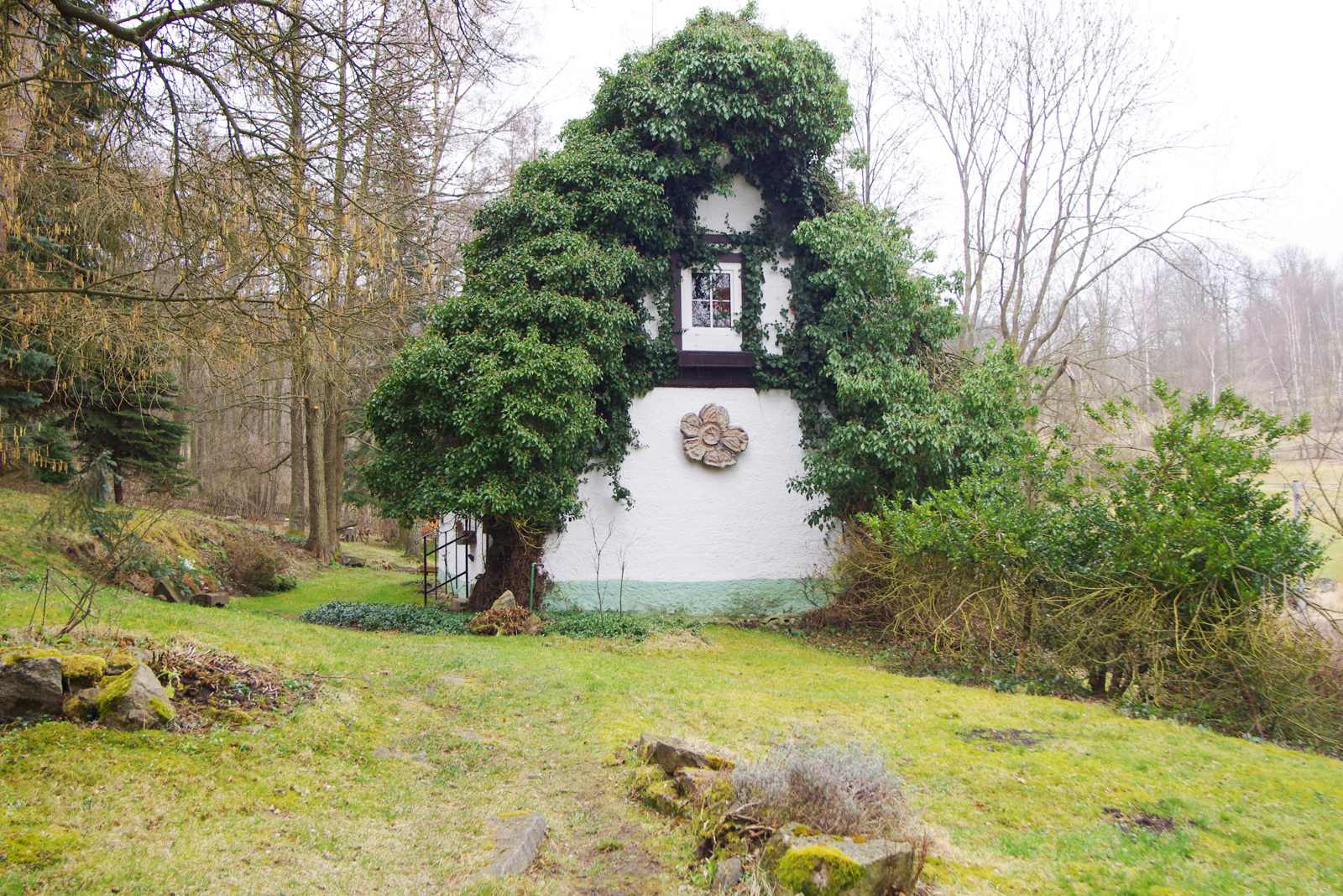 chalupa v osadě Novina, Slavkovský Les, okres Sokolov